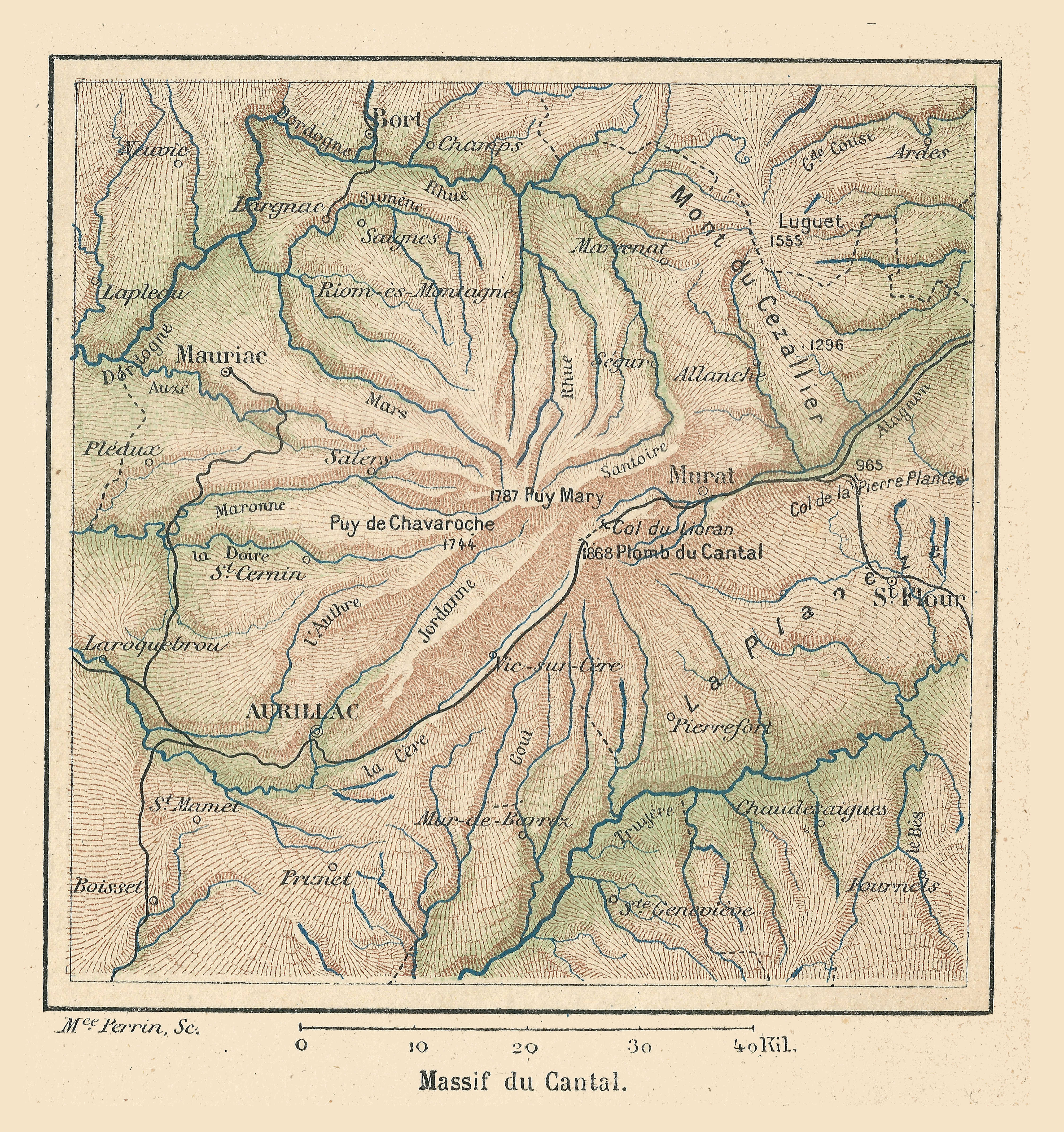 Cartes du géographe Franz Schrader